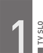 Logo kanálu TV SLO 1 (od roku 2012).